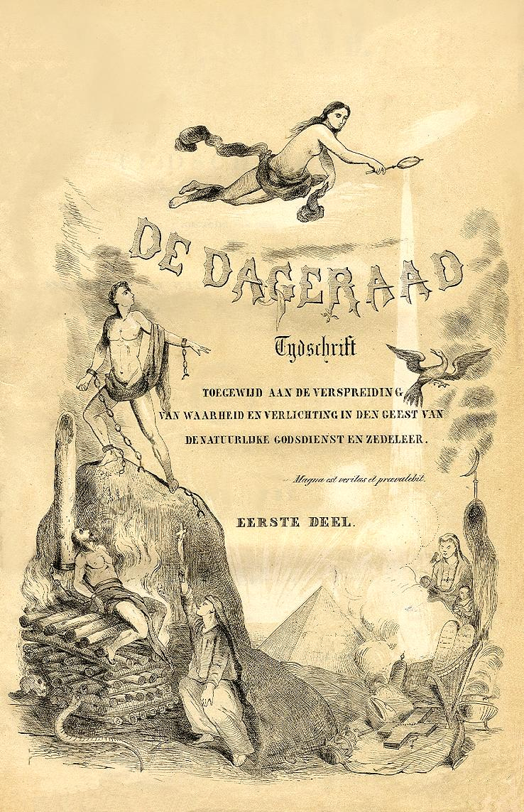 Zeitschrift "De Dageraad". Erstausgabe 1855